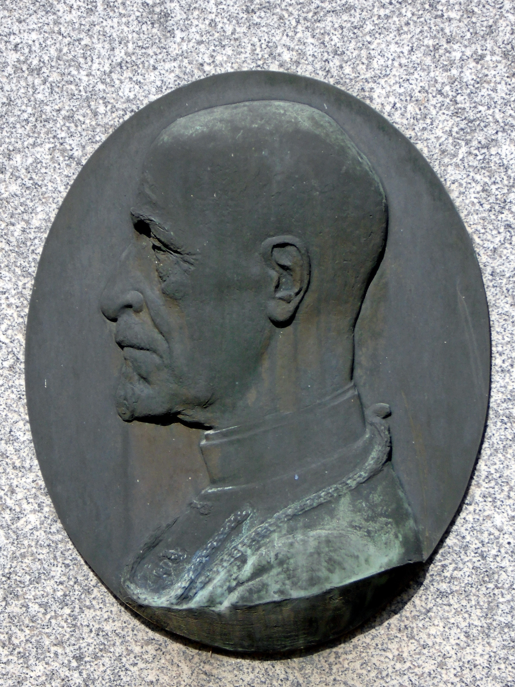 Hřbitov v Kluku. Jakub Vondrovic.